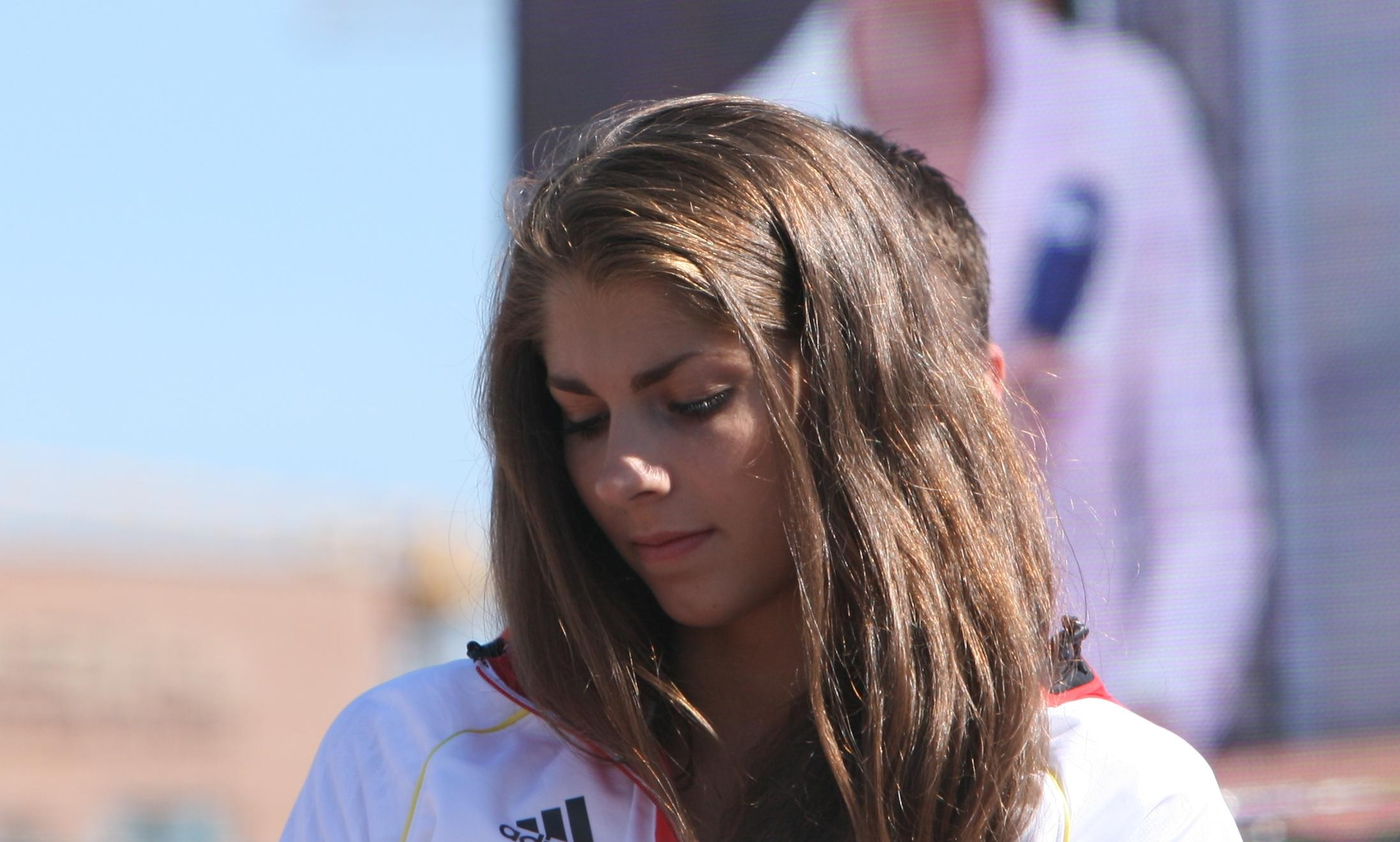 Judith Hauser beim Empfang der Olympioniken 2012 in Hamburg